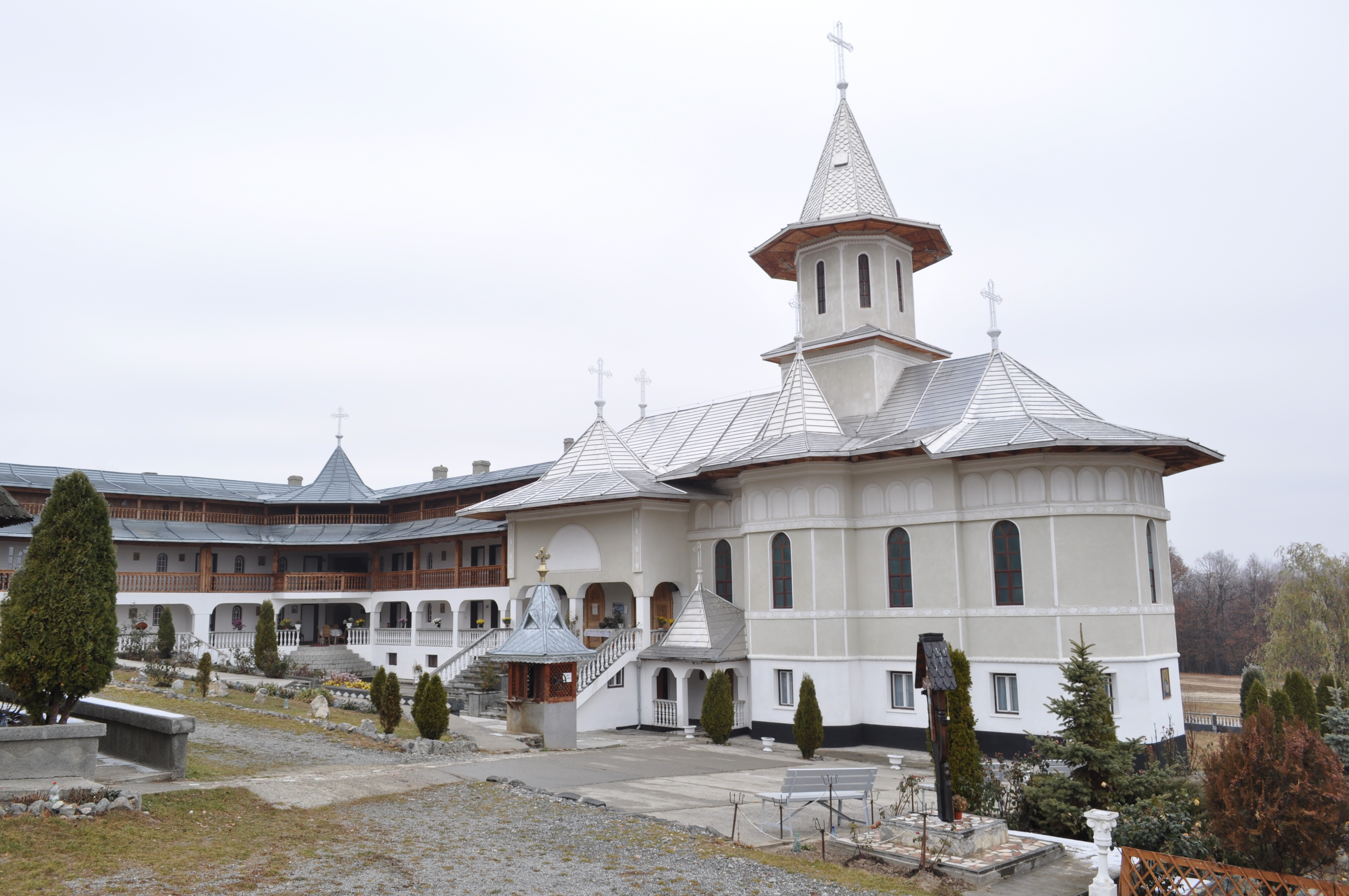 Biserica de lemn "Adormirea Maicii Domnului" a mănăstirii Bic, strămutată din satul Stâna